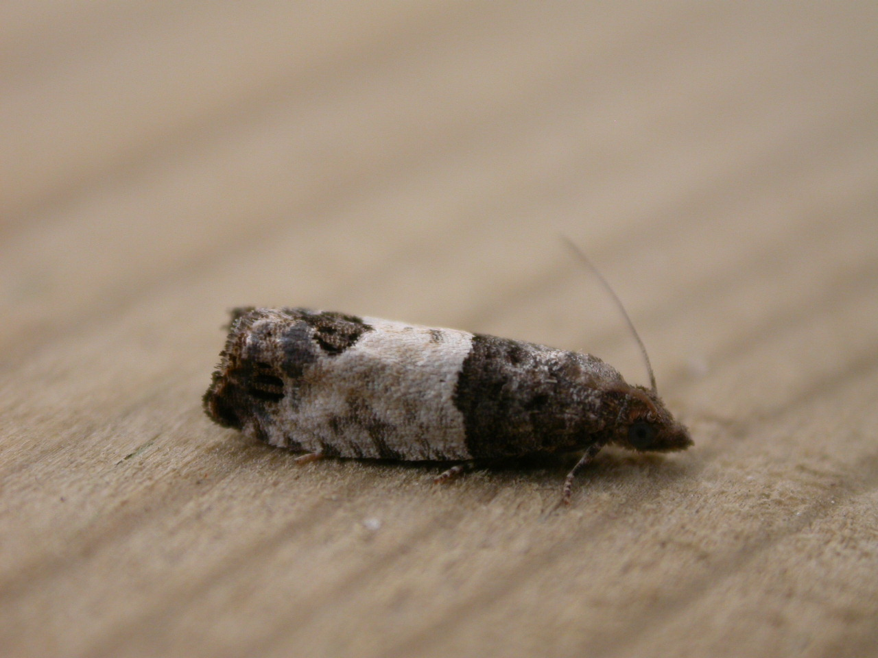 Spilonota ocellana, Gastes, Landes, SW France, 5/6 July 2003